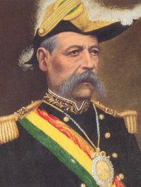 Narciso Campero (1813-1896), militar y político boliviano, presidente de Bolivia de 1880 a 1884.